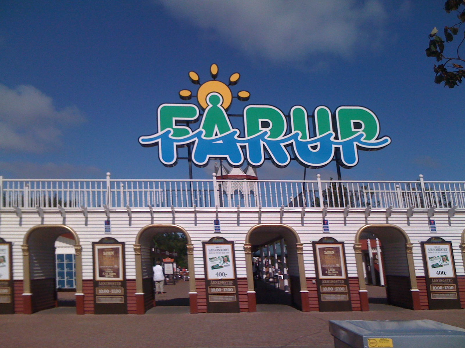 Haupteingang Fårup Sommerland